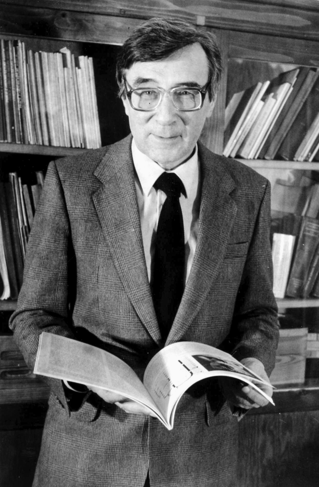 Lech Kalinowski